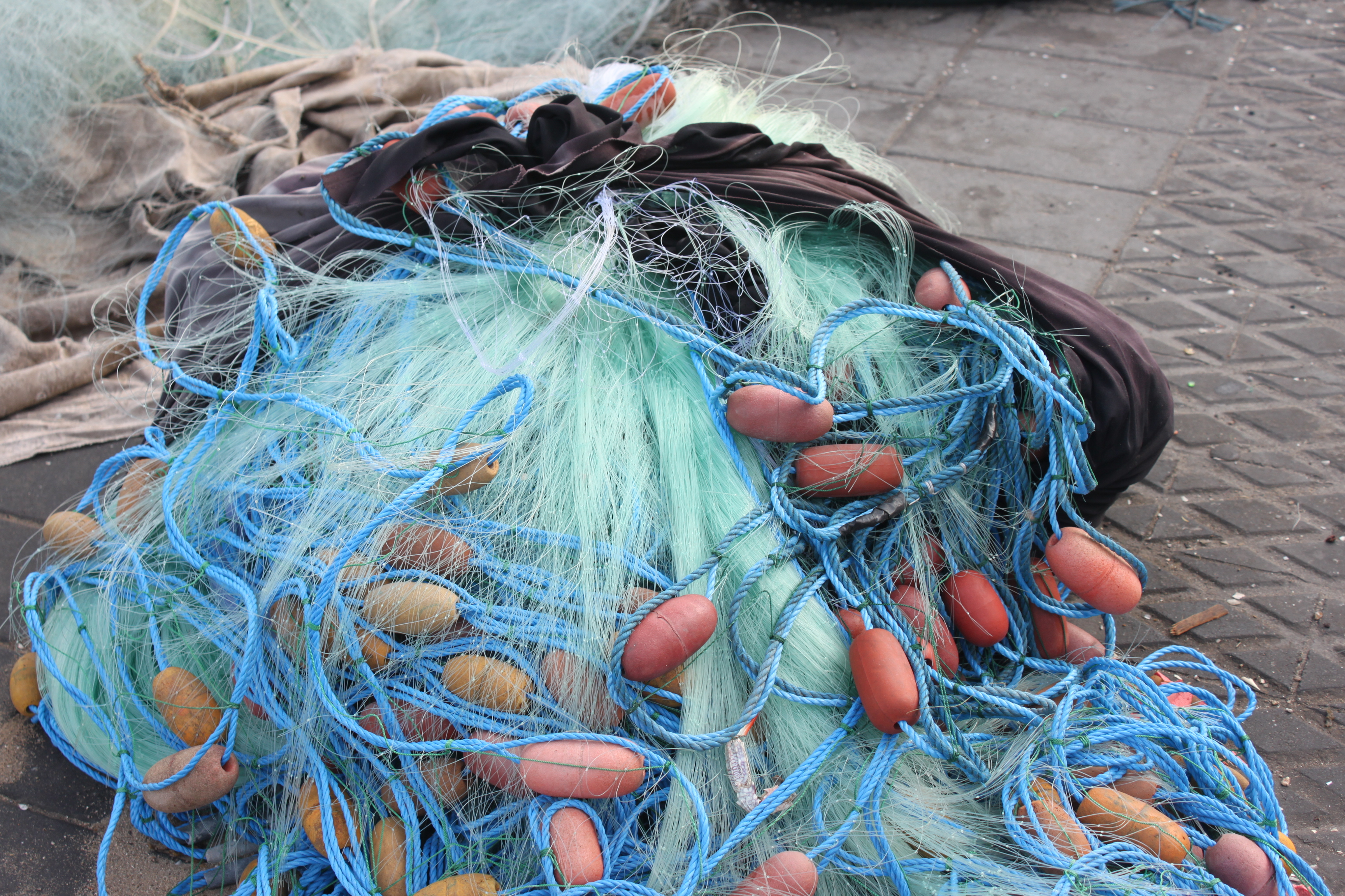 רשת דיג נמל יפו